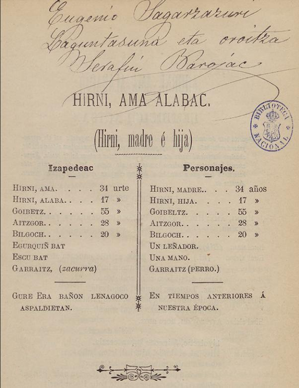 Searfin Barojaren antzezlana, Hirni, Ama Alabac. Egileak berak sinatutako edizio orijinala, Espainiako Liburutegi Nazionalean gordea.